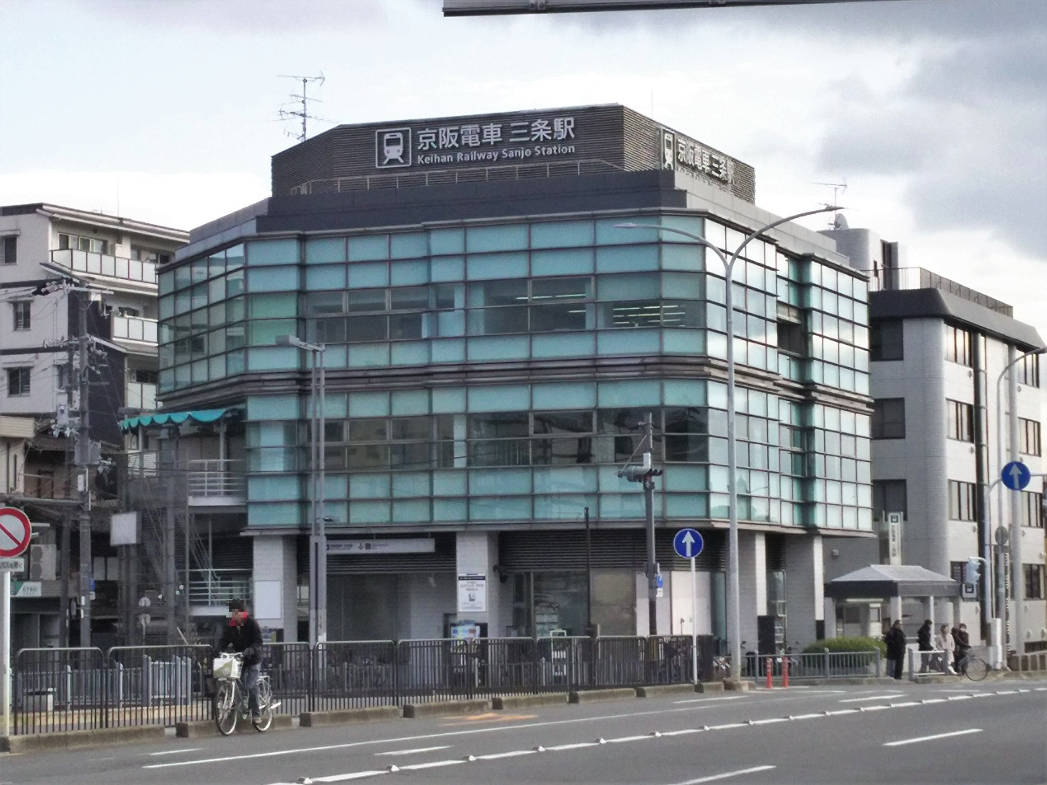 京阪本線三条駅南ビル（京都市東山区）